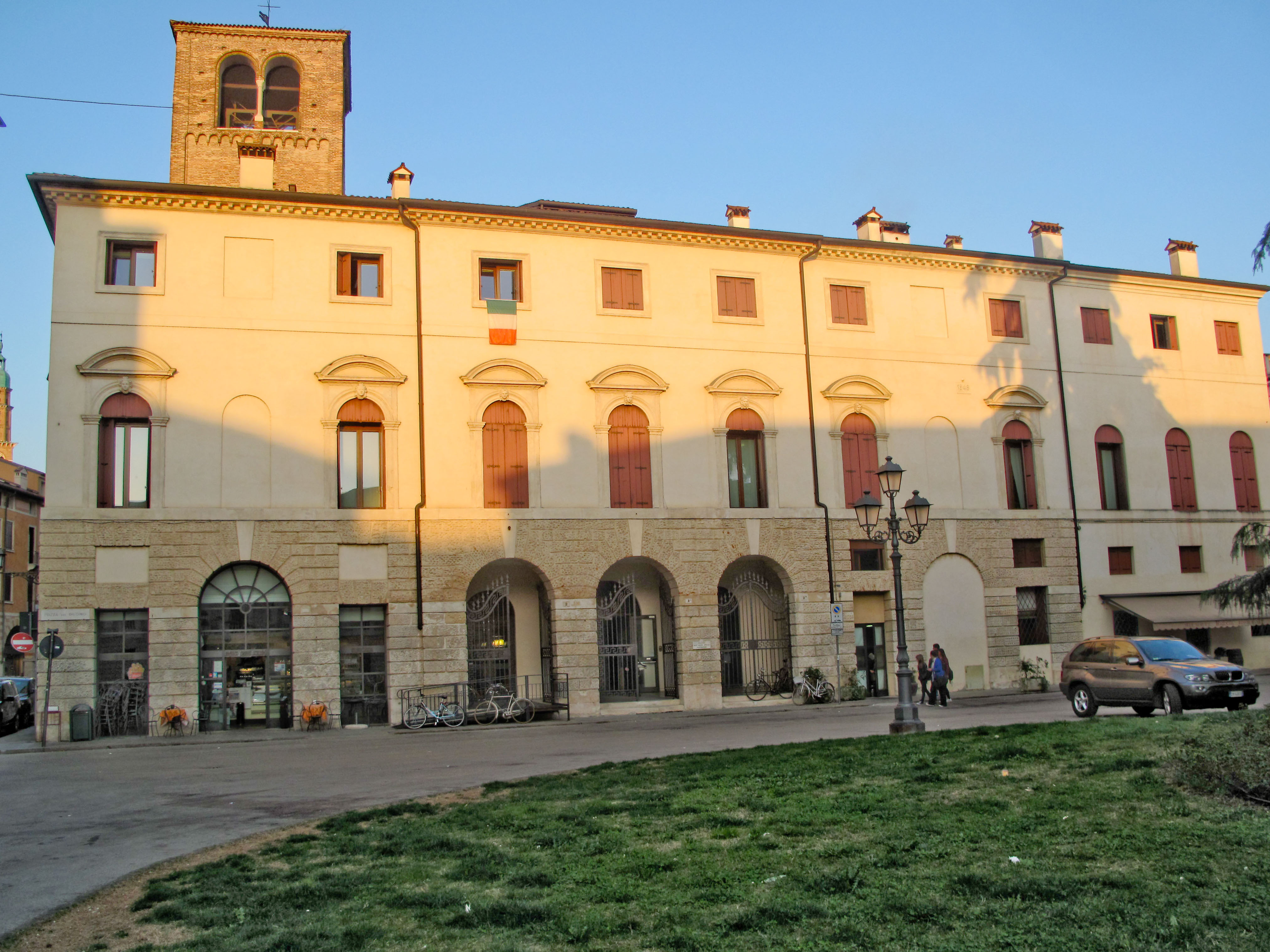 Vicenza - Palazzo delle Opere sociali in piazza Duomo